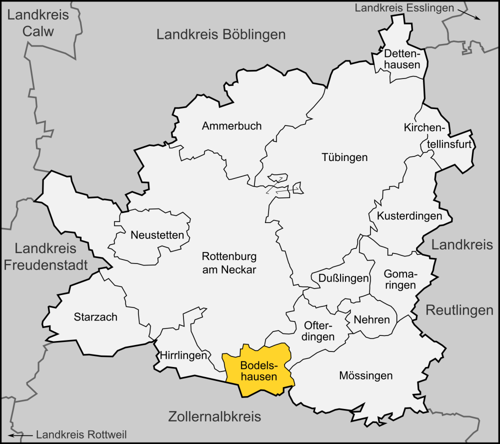 Karte der Gemeinde Bodelshausen im Landkreis Tübingen